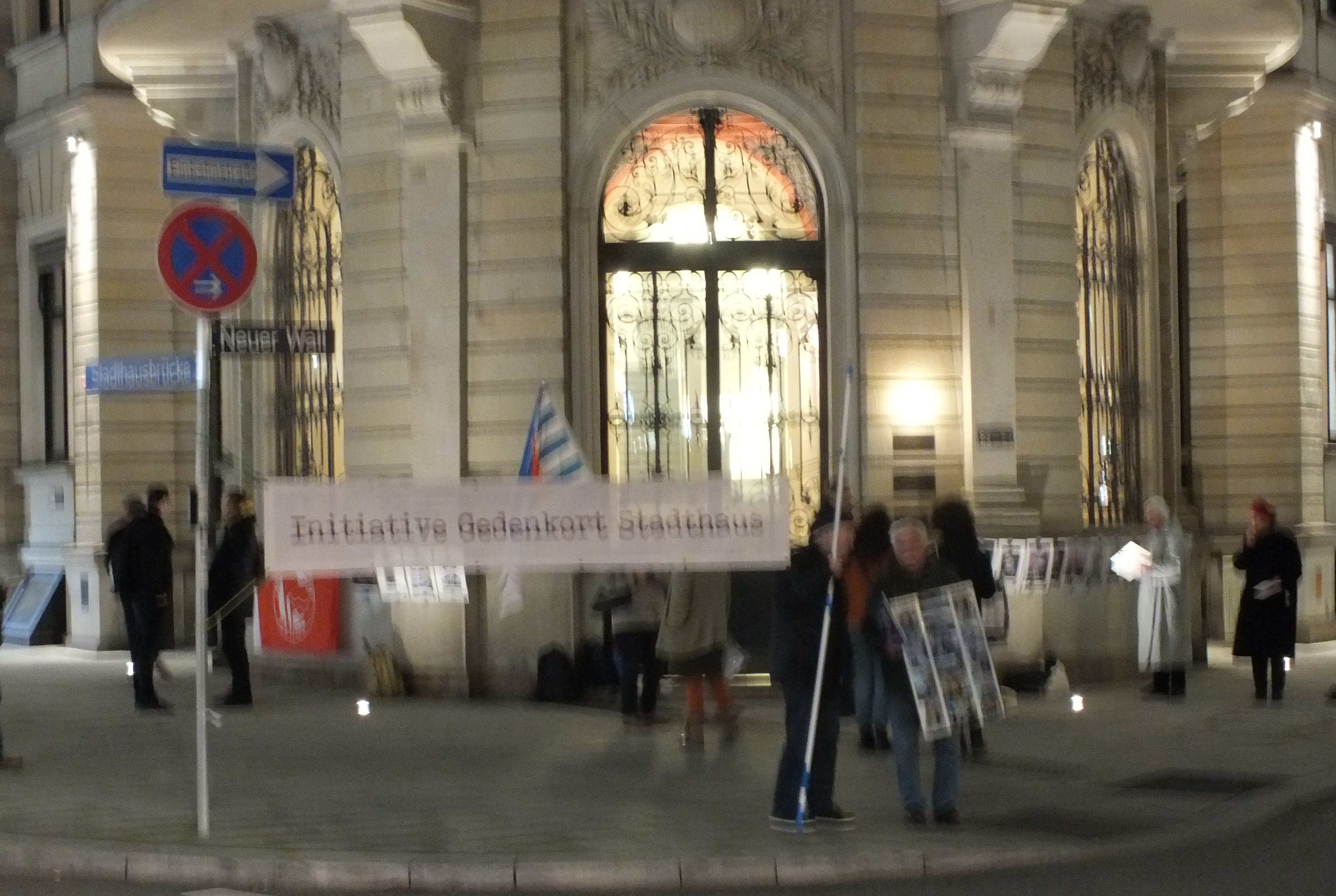 Mahnwache für einen würdigen Gedenkort im Stadthaus